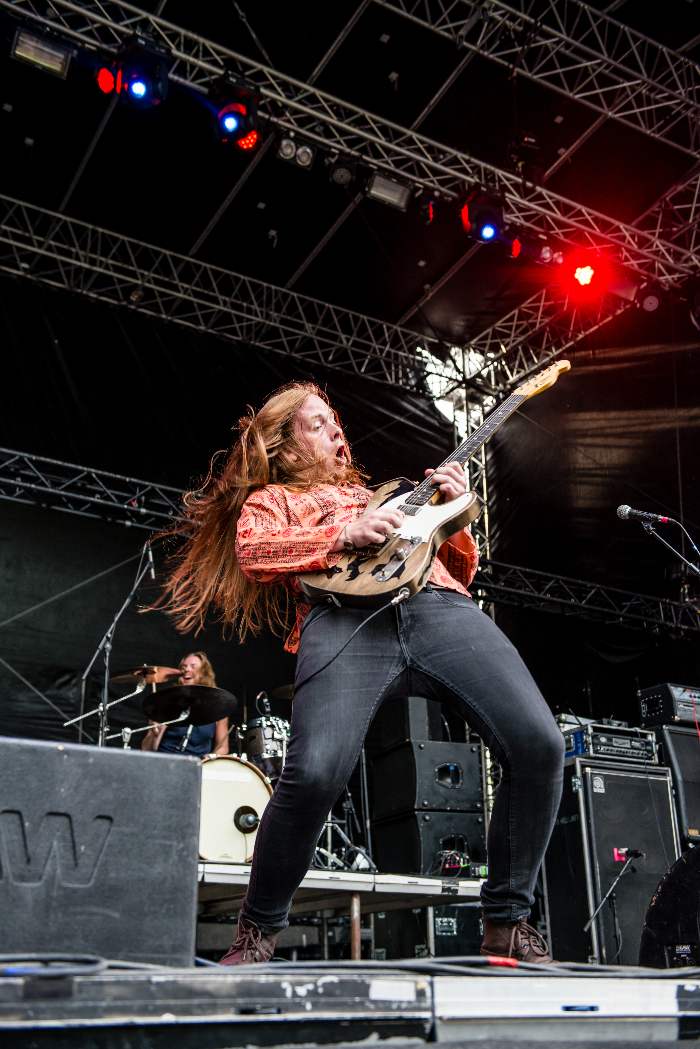 'Turock Open Air 2015; Essen': 'The Vintage Caravan'